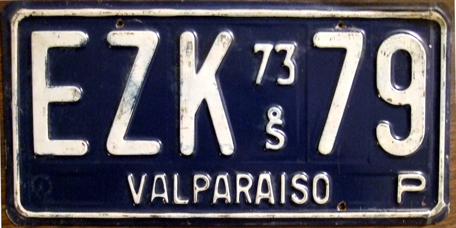 CHILE 1973 Valpariaso